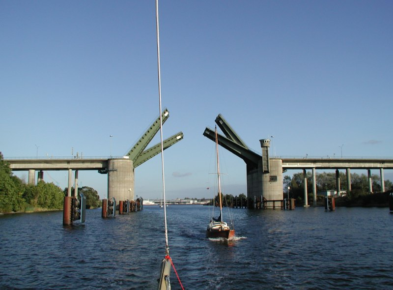 Die Herrenbrücke, von mir selbst fotografiert am 24.08.2003